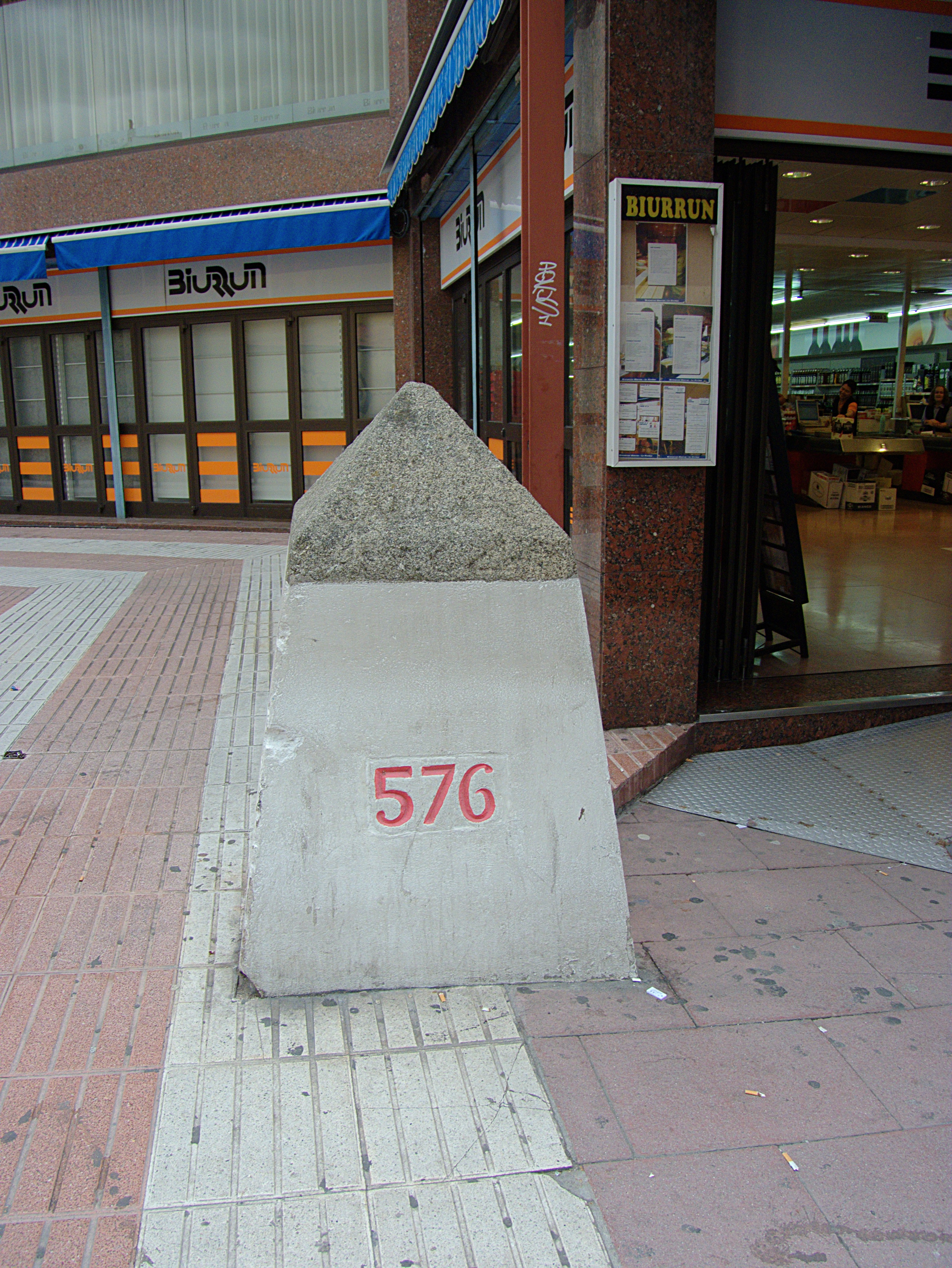 Borne pyramidale n° 576, Le Perthus(Pyrénées-Orientales, Languedoc-Roussillon, France), Els Límits (Quartier espagnol du Perthus), la Jonquera (Haut-Ampurdan, Gérone, Catalogne, Espagne)